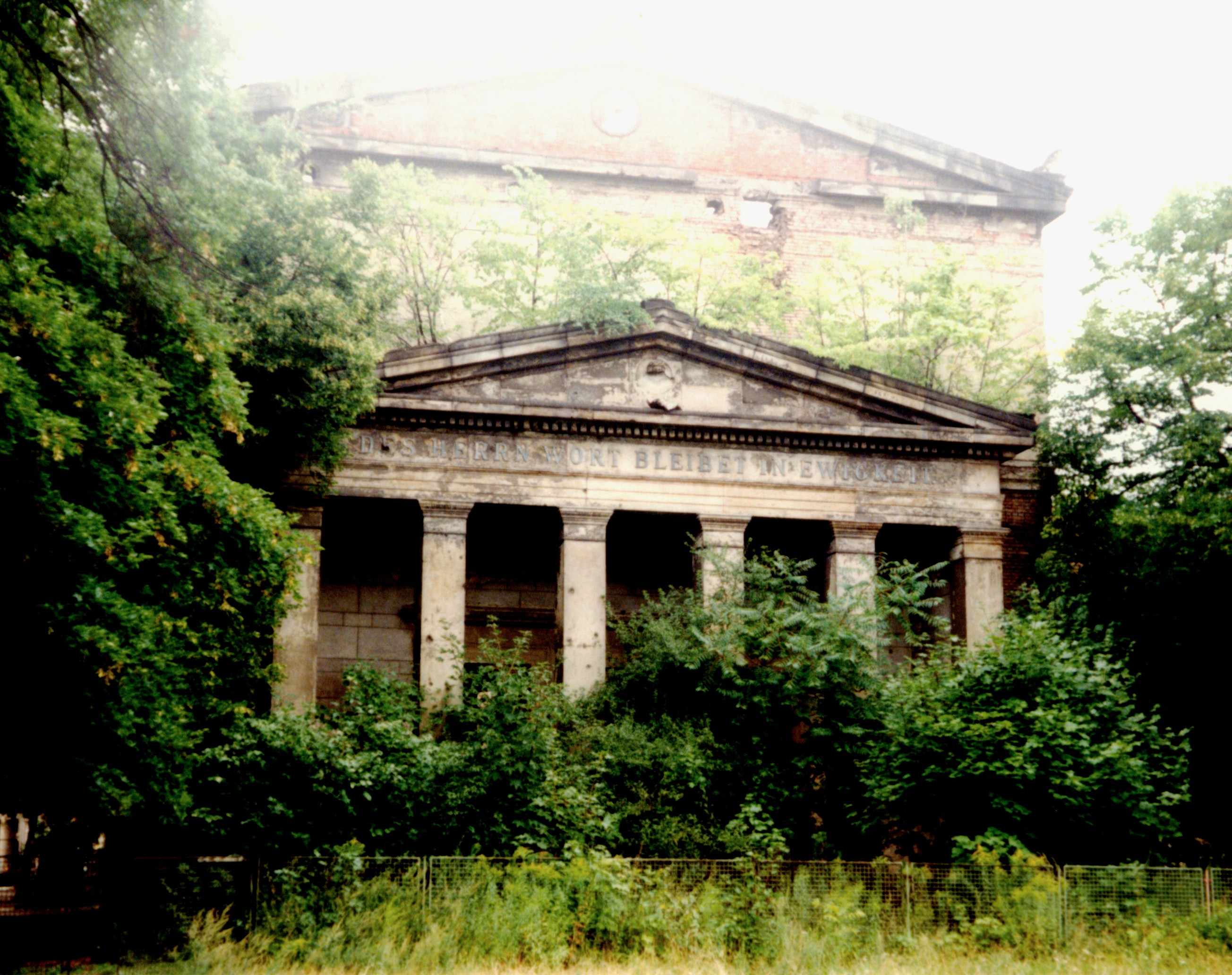 Die berliner Elisabethkirche im August 1991